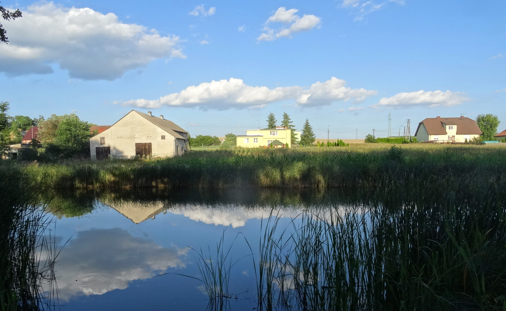 Wyspa Parkowa w Łabiszynie